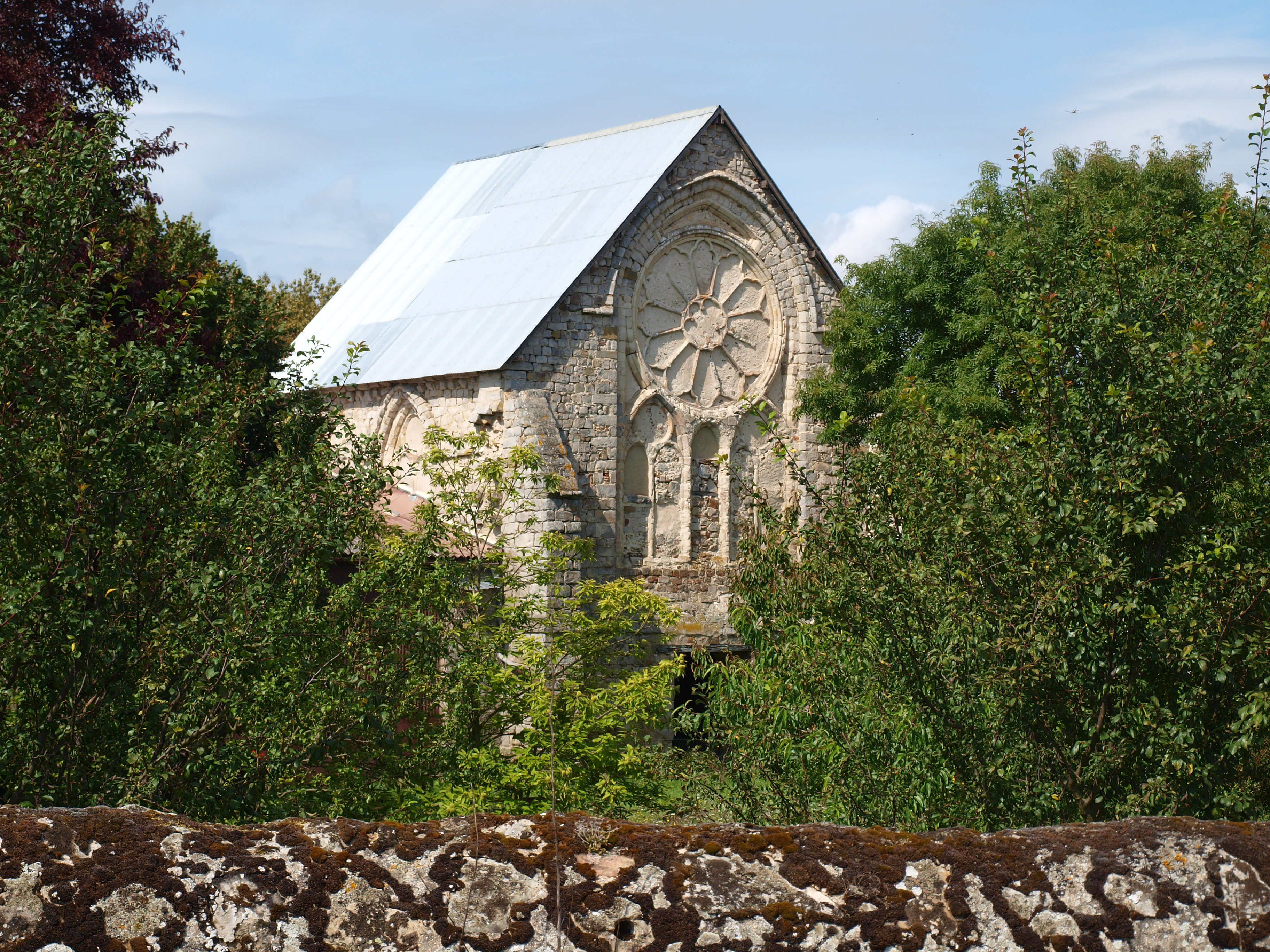 Michery (Yonne, France) ; ancienne Abbaye de la Cour-Notre-Damelabbaye de la Cour-Notre-Dame, aujourd'hui bâtiment d'exploitation agricole.